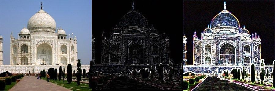 Imagen original sobre la que se aplica un filtro Laplaciano y otro Sobel